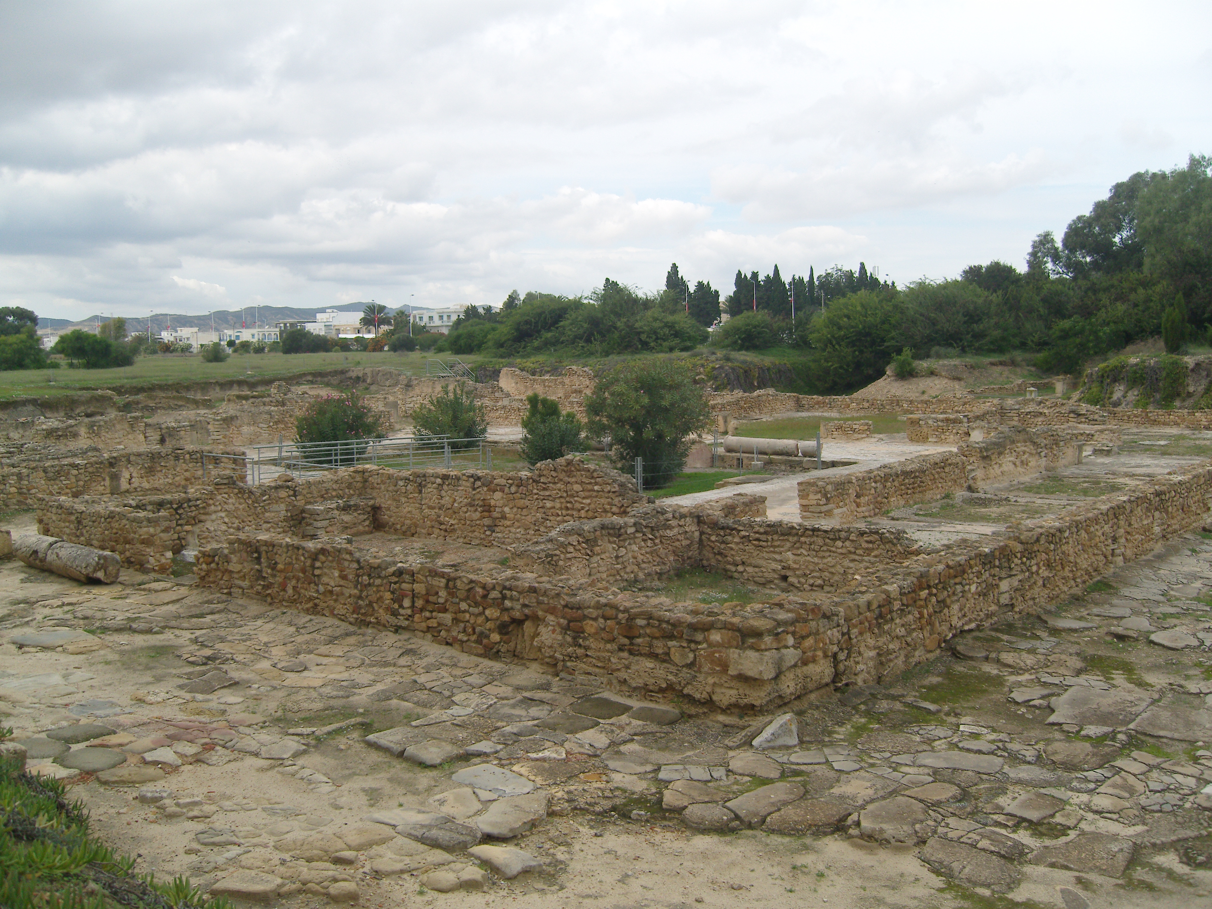 Vue générale de la Maison des Nymphes du site archéologique de Néapolis